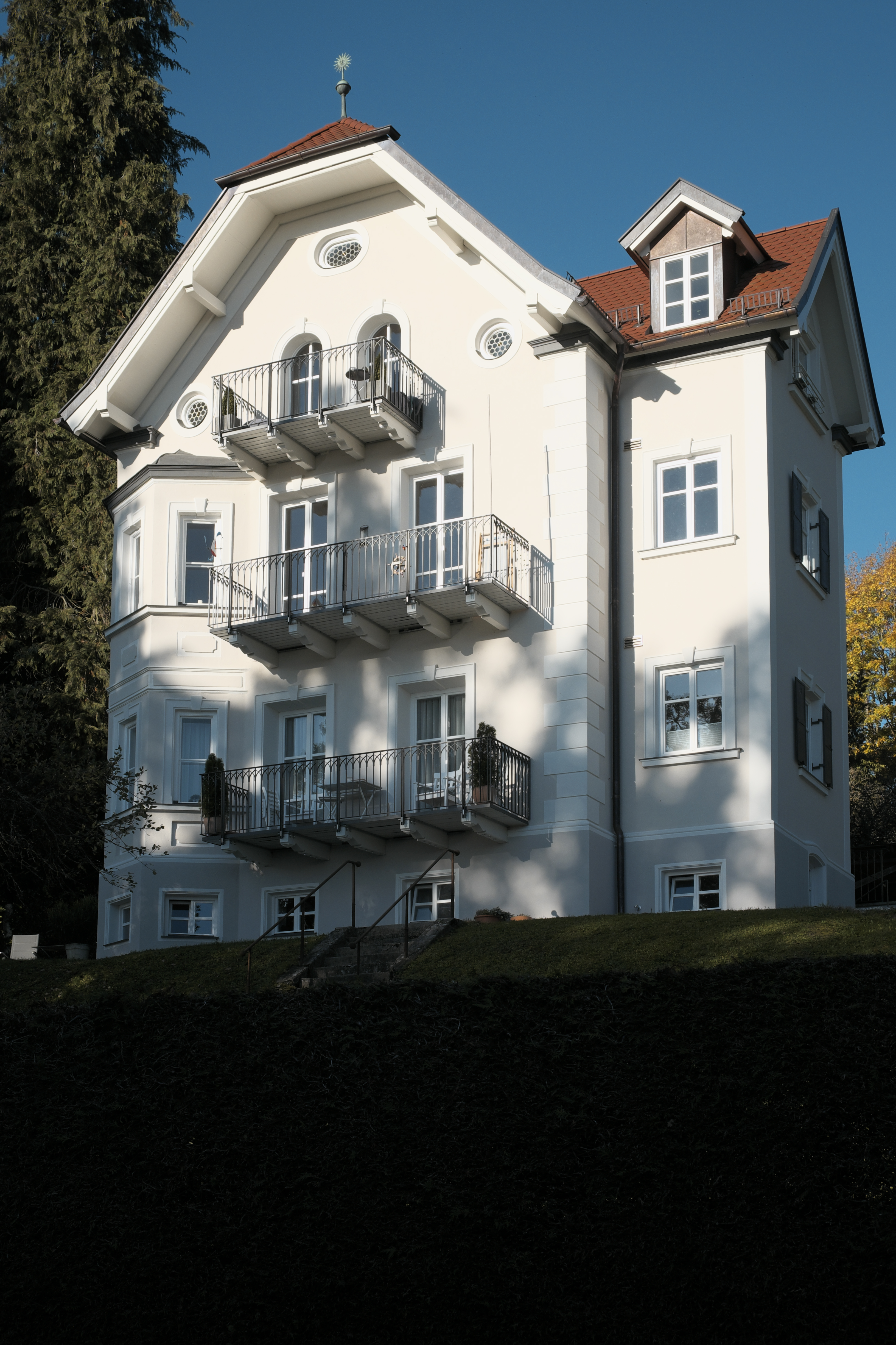 Villa in der Seestraße 16 in Unterschondorf (Schondorf am Ammersee) im Landkreis Landsberg am Lech (Bayern/Deutschland)